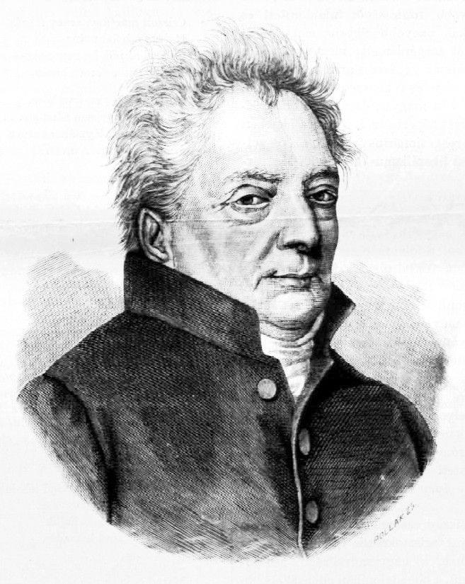 Viczay Mihály (1757–1831) birtokos, amatőr archeológus és numizmata, műgyűjtő portréja. Pollák Zsigmond korabeli festmény alapján készült metszete